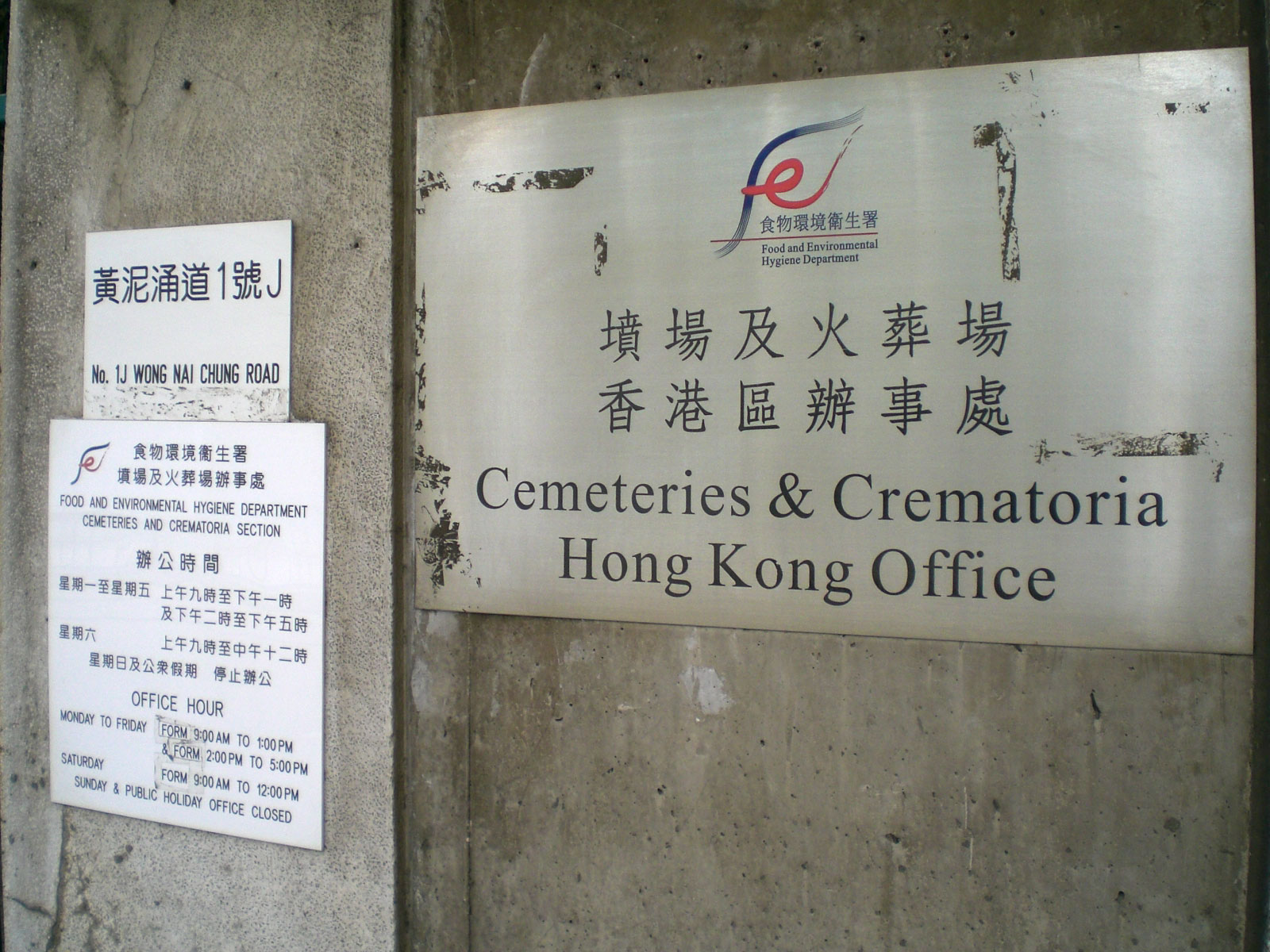 中文（香港）: 香港墳場, 食物環境衛生署管理, 跑馬地zh:黃泥涌道1J號